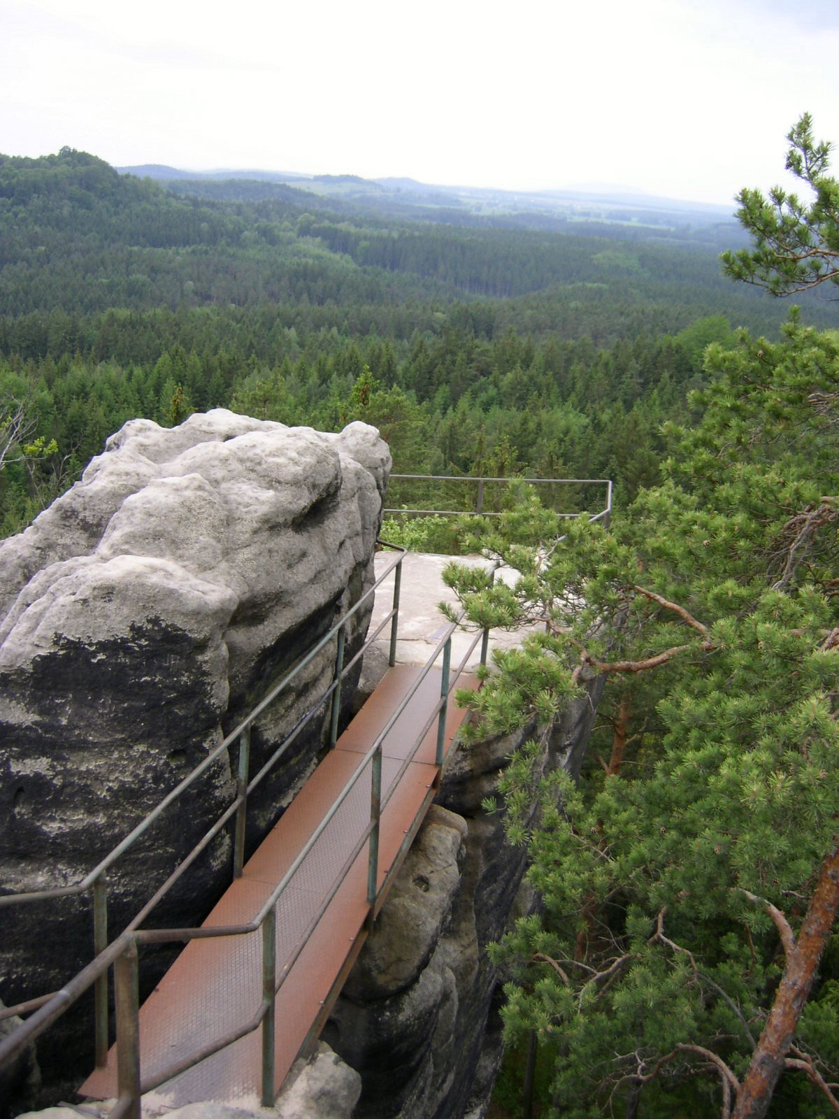 Burg Schauenstein Böhmische Schweiz von Thomas Schaffhirt. Das Foto wurde von mir im Juni 2004 gemacht.